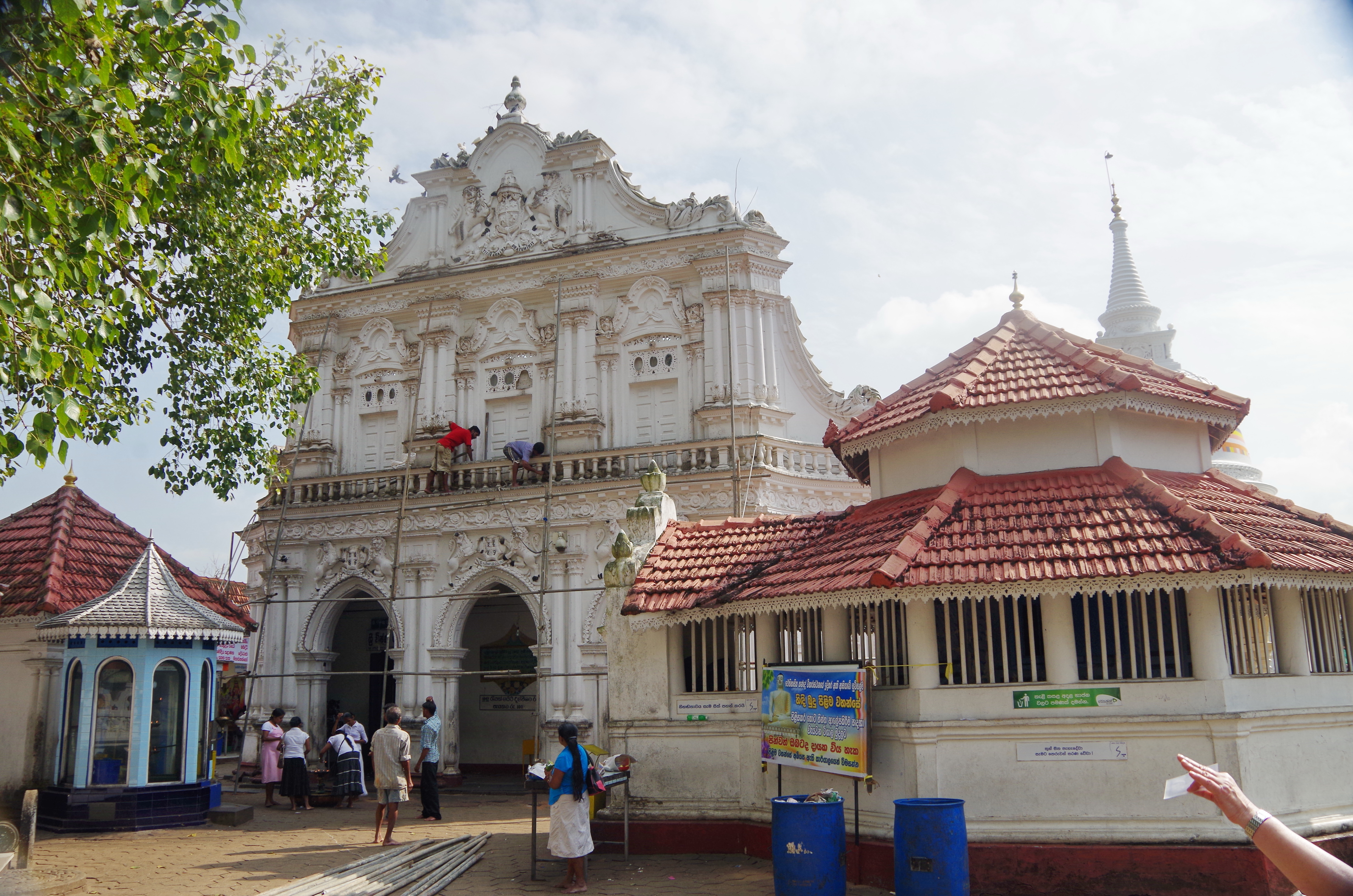 Kande Vihara, Tempel